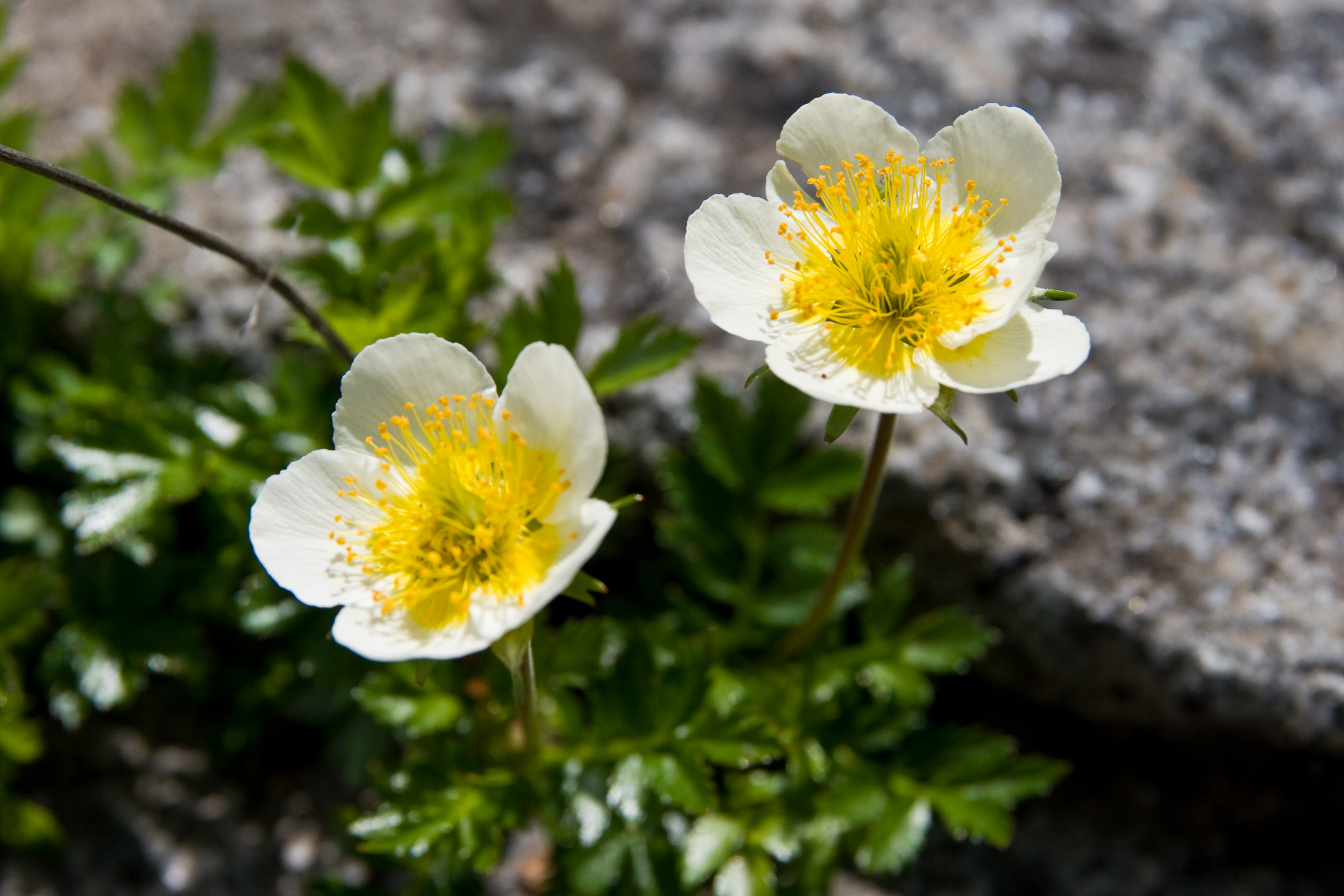 チングルマ (学名:Geum pentapetalum)